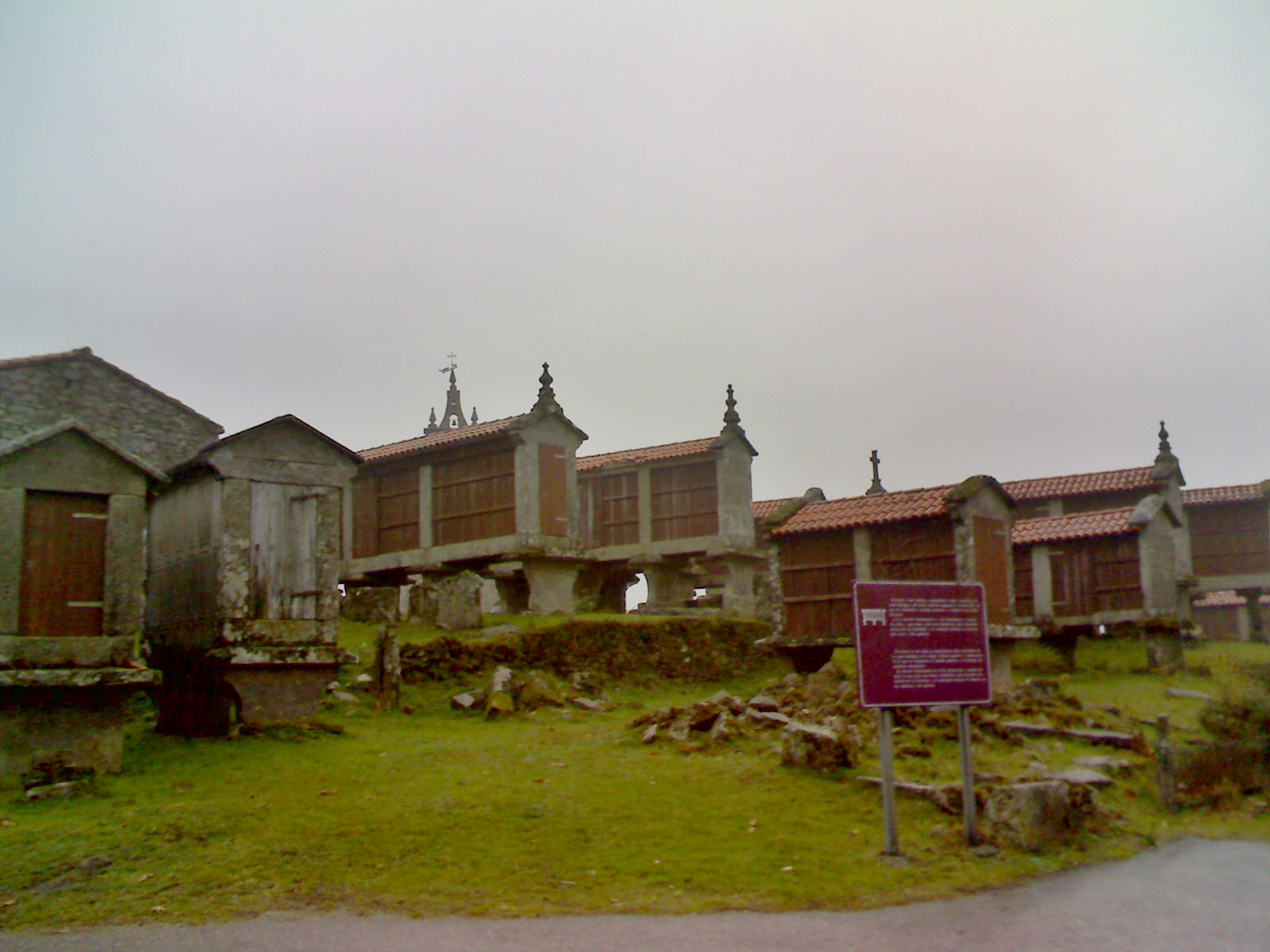 Conxunto de canastros en Filgueira (Castro)